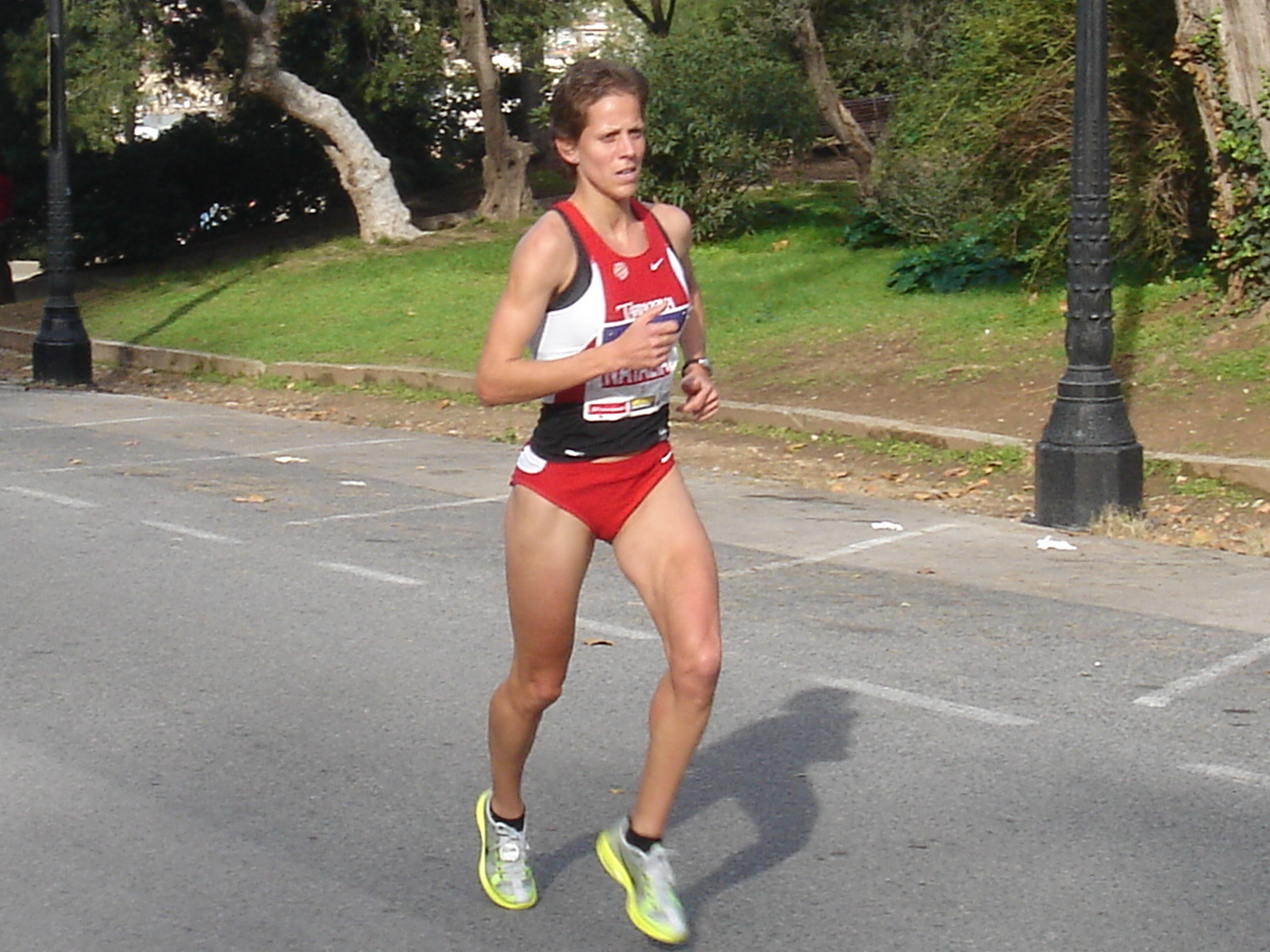 Natalia Rodríguez disputando la Jean Bouin de Barcelon 2008